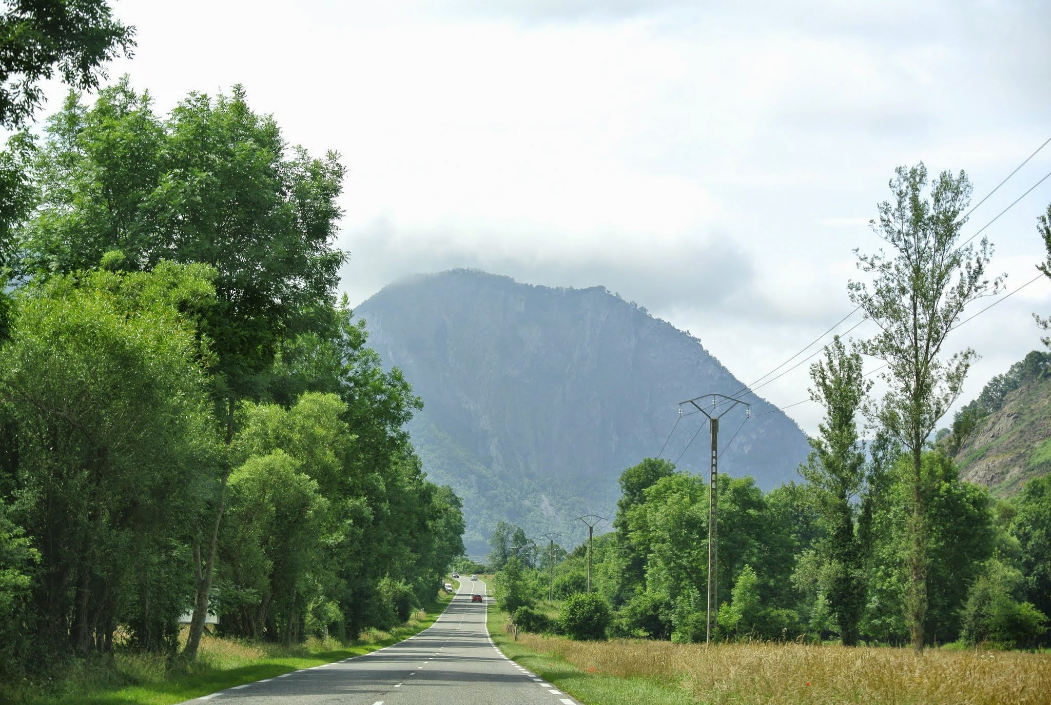 31440 Argut-Dessous, France